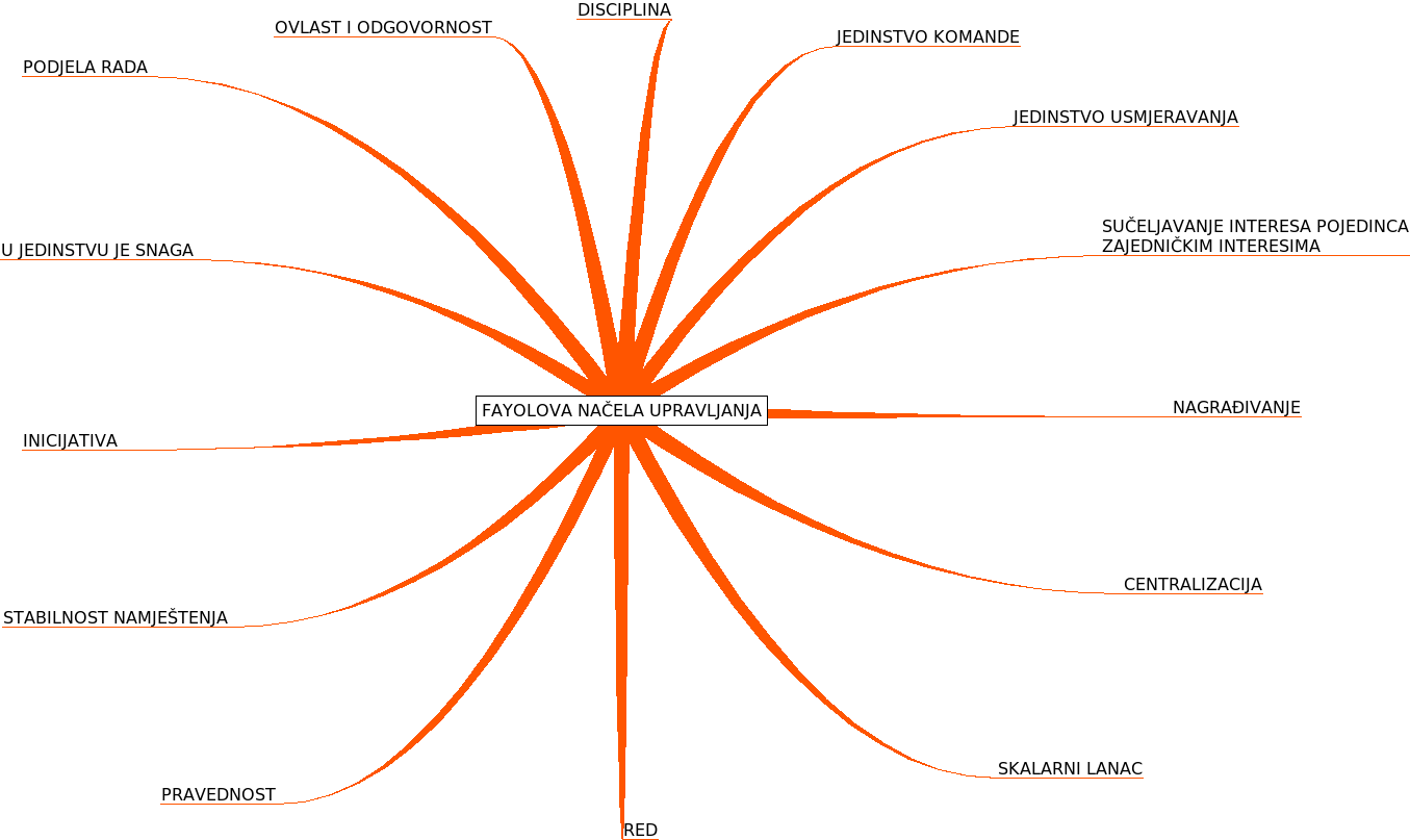 Fayolova načela upravljanja